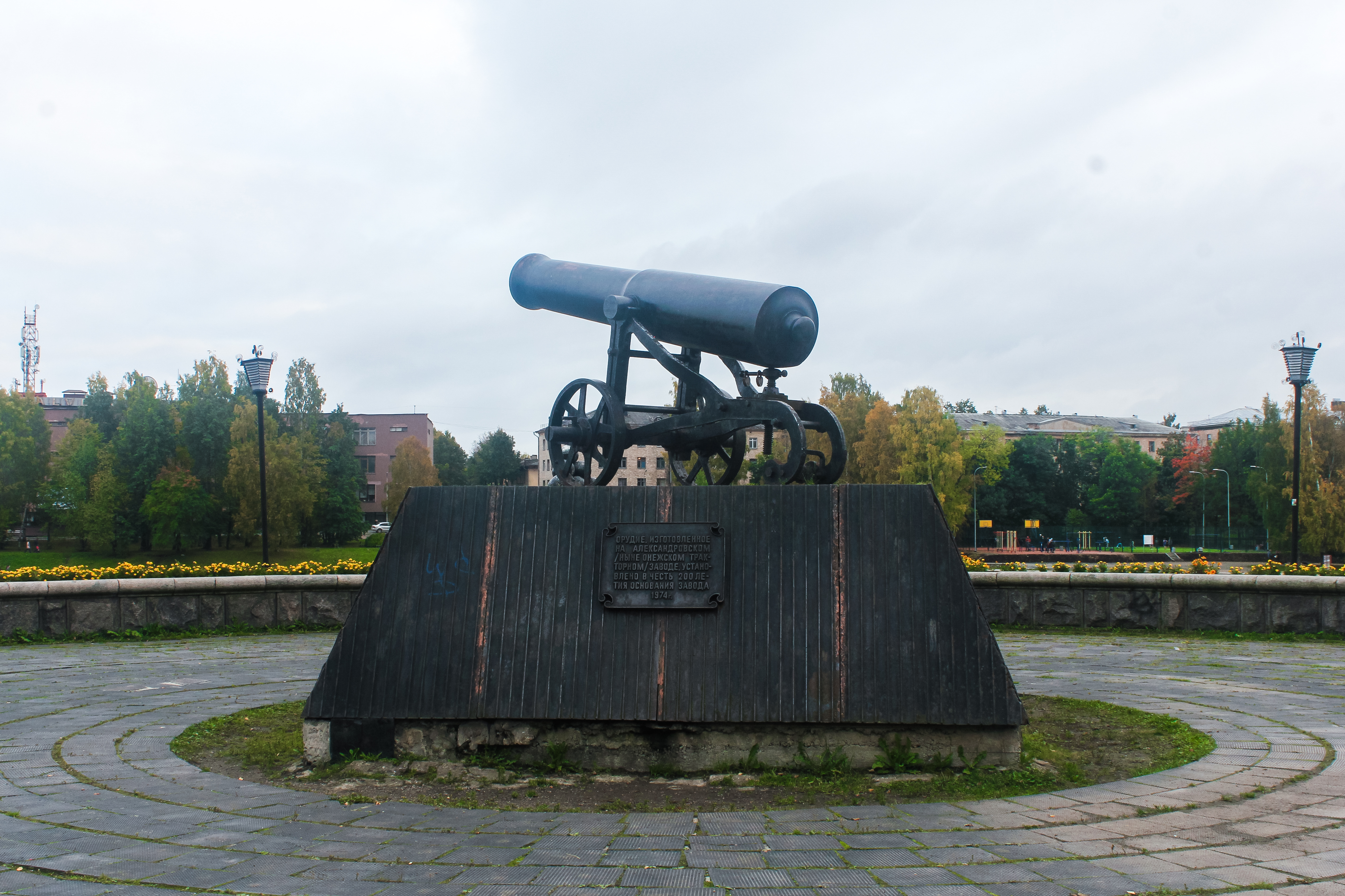 Место, где был построен Петровский завод, положивший основание Петрозаводску. Установлен памятный знак - пушка: площадь Кирова (устье р. Лососинки, тополиная роща), Петрозаводск, Карелия